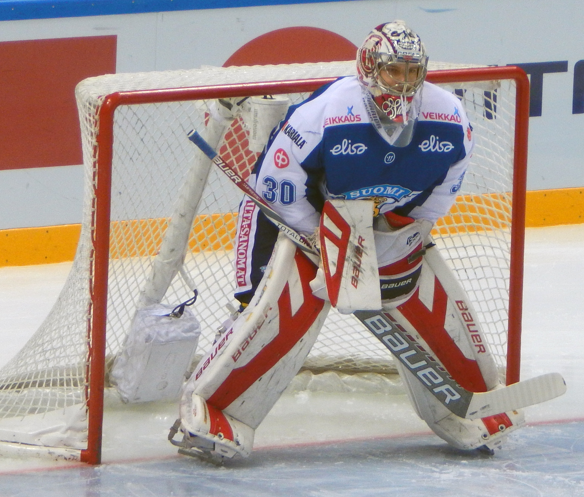 Харри Сятери на Кубке Первого Канала 2015 против Швеции